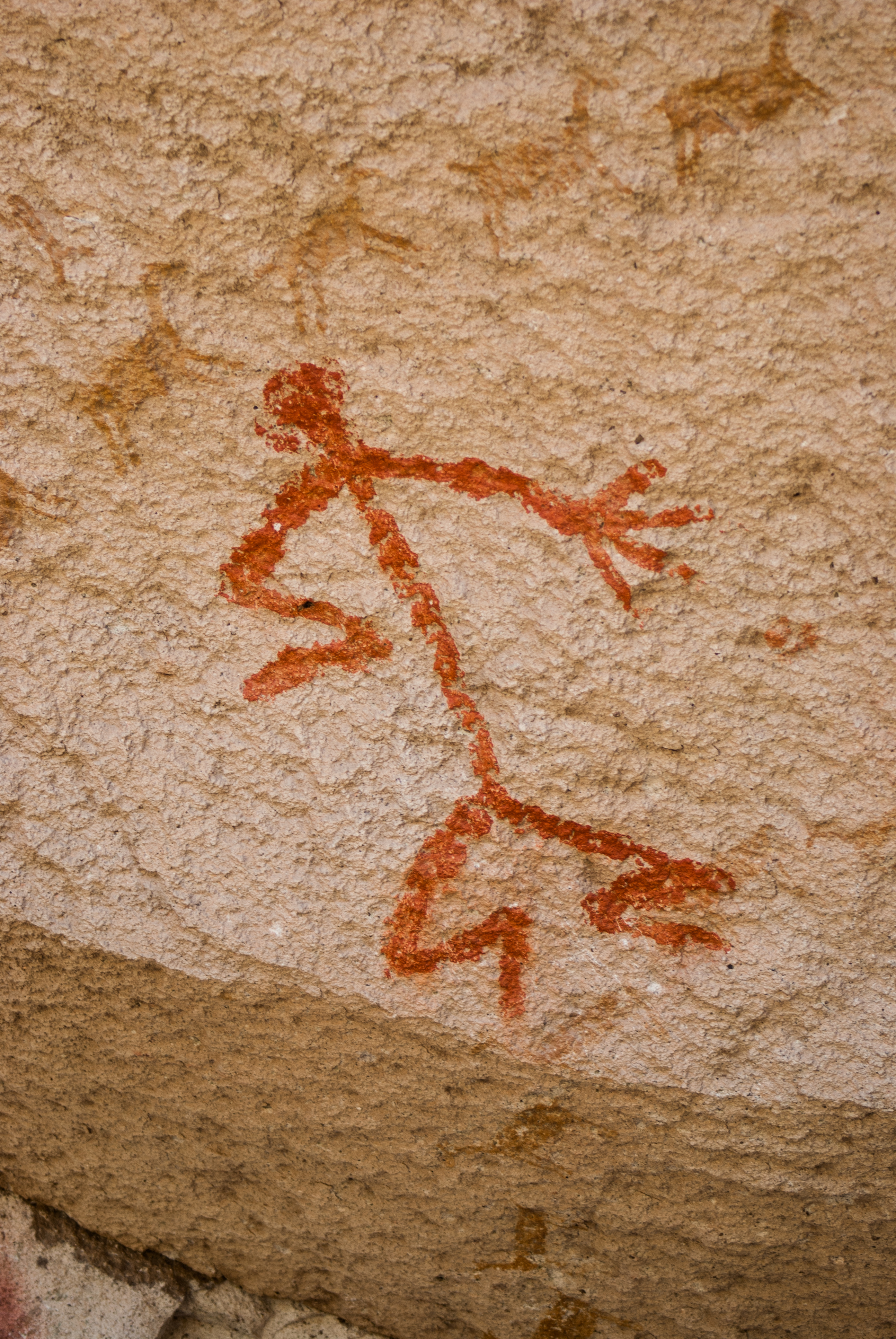 Símbolos humanos encontrados en las pinturas rupestres de la Cueva de las Manos